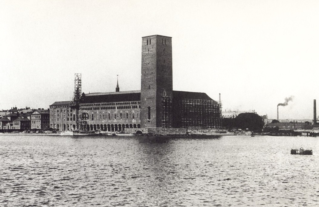 Stockholms Stadshus under byggnad, 1919